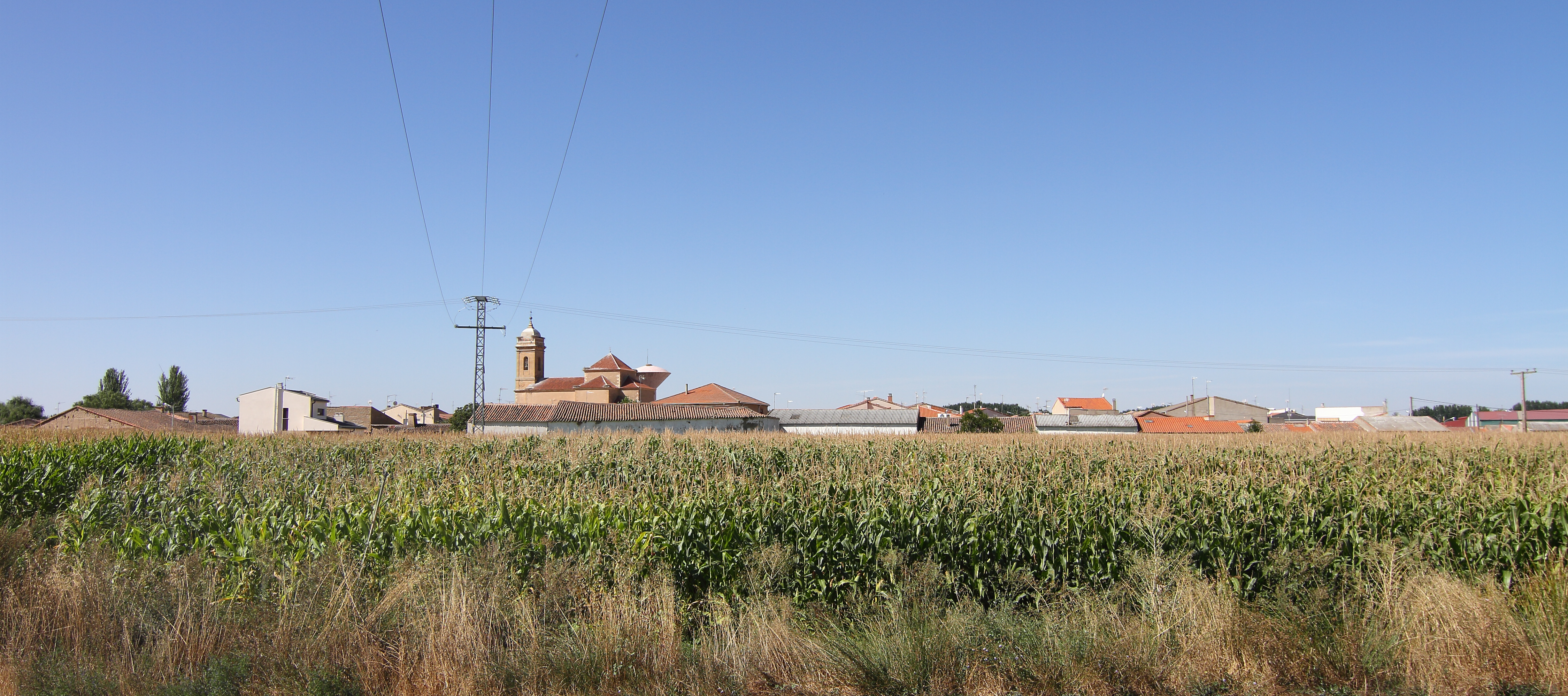 Encinas de Abajo, desde carretera DSA-640